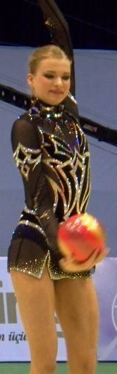 Ольга Капранова (Россия). ЧЕ в Баку 2009